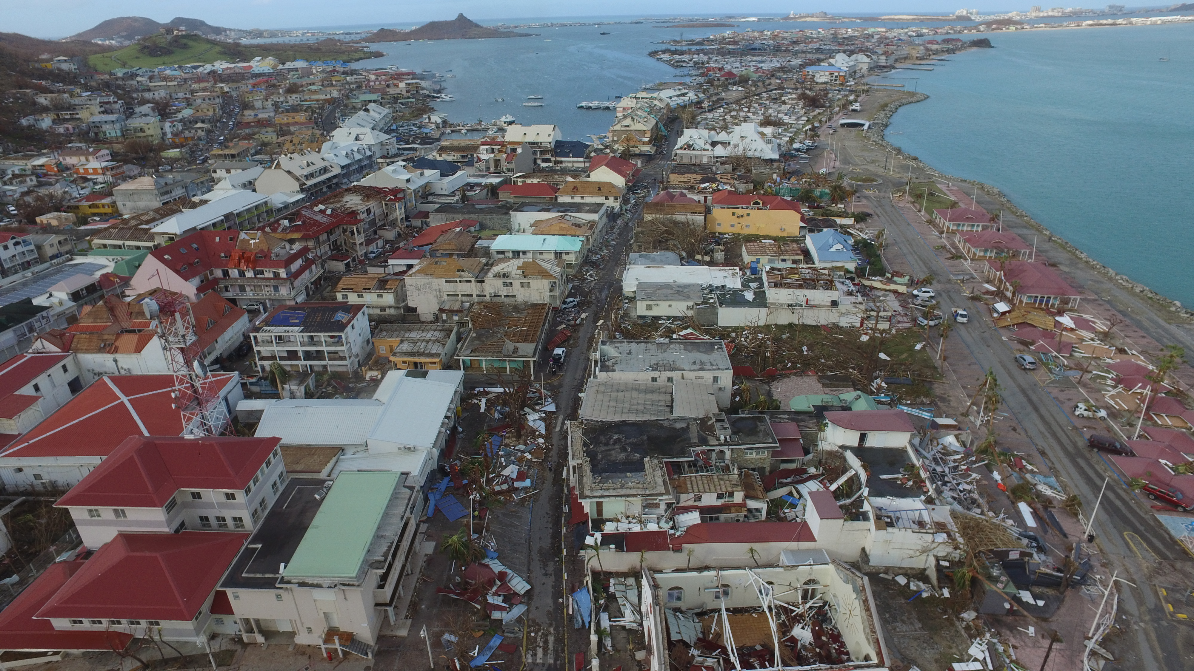 UIISC1 - La ville de Marigot sur l'île de Saint-Martin, deux jours après l'ouragan IRMA